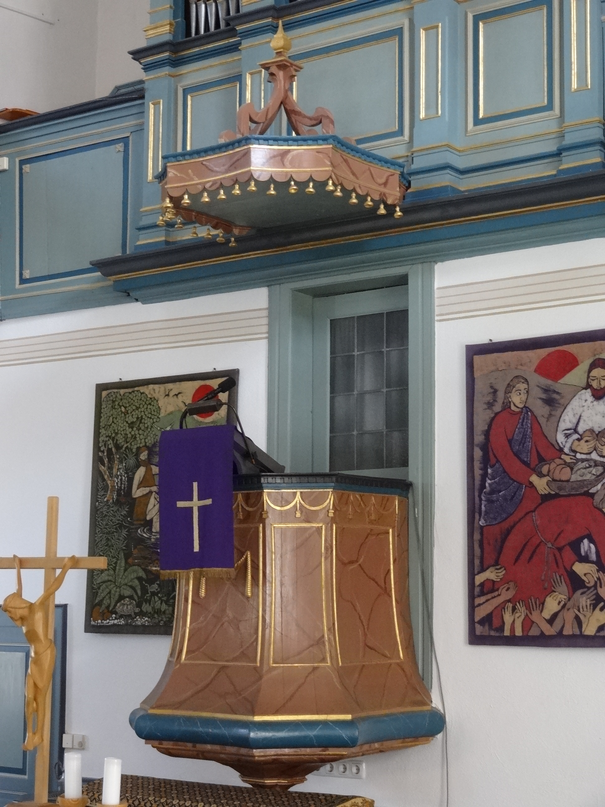 Ev. Kirche Rödgen (Gießen)